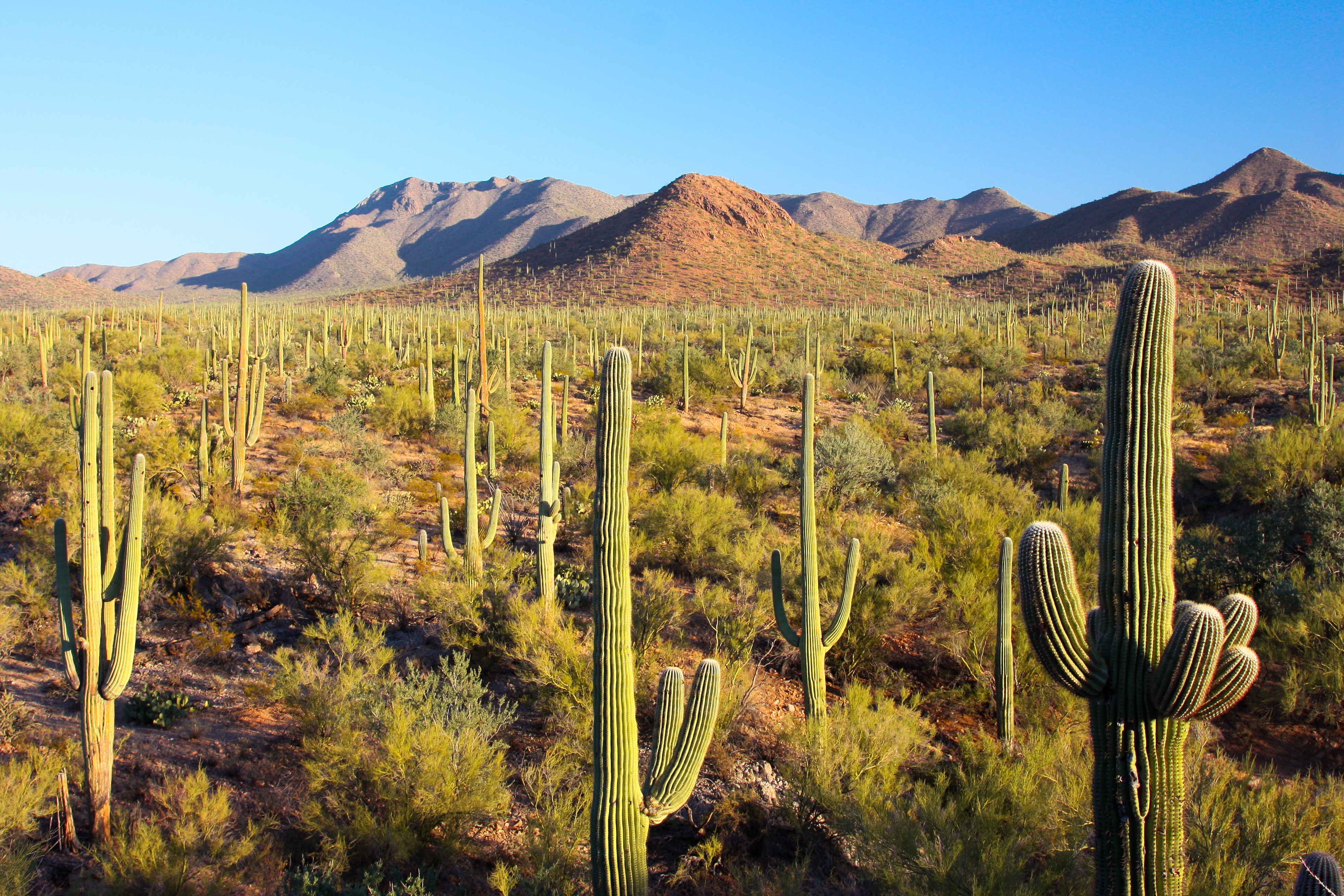 Saguaro National Park